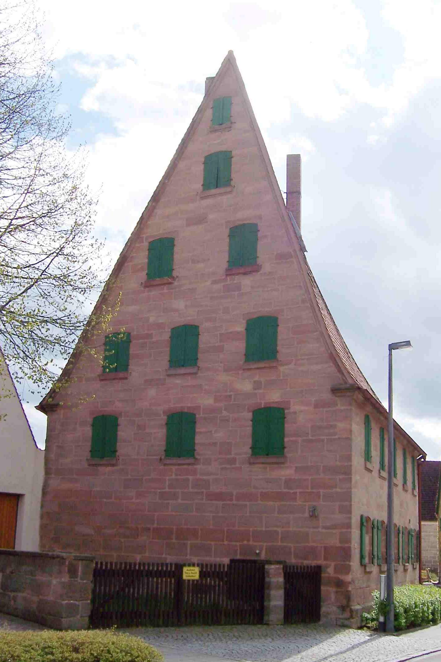 Großweingarten Hauptstraße